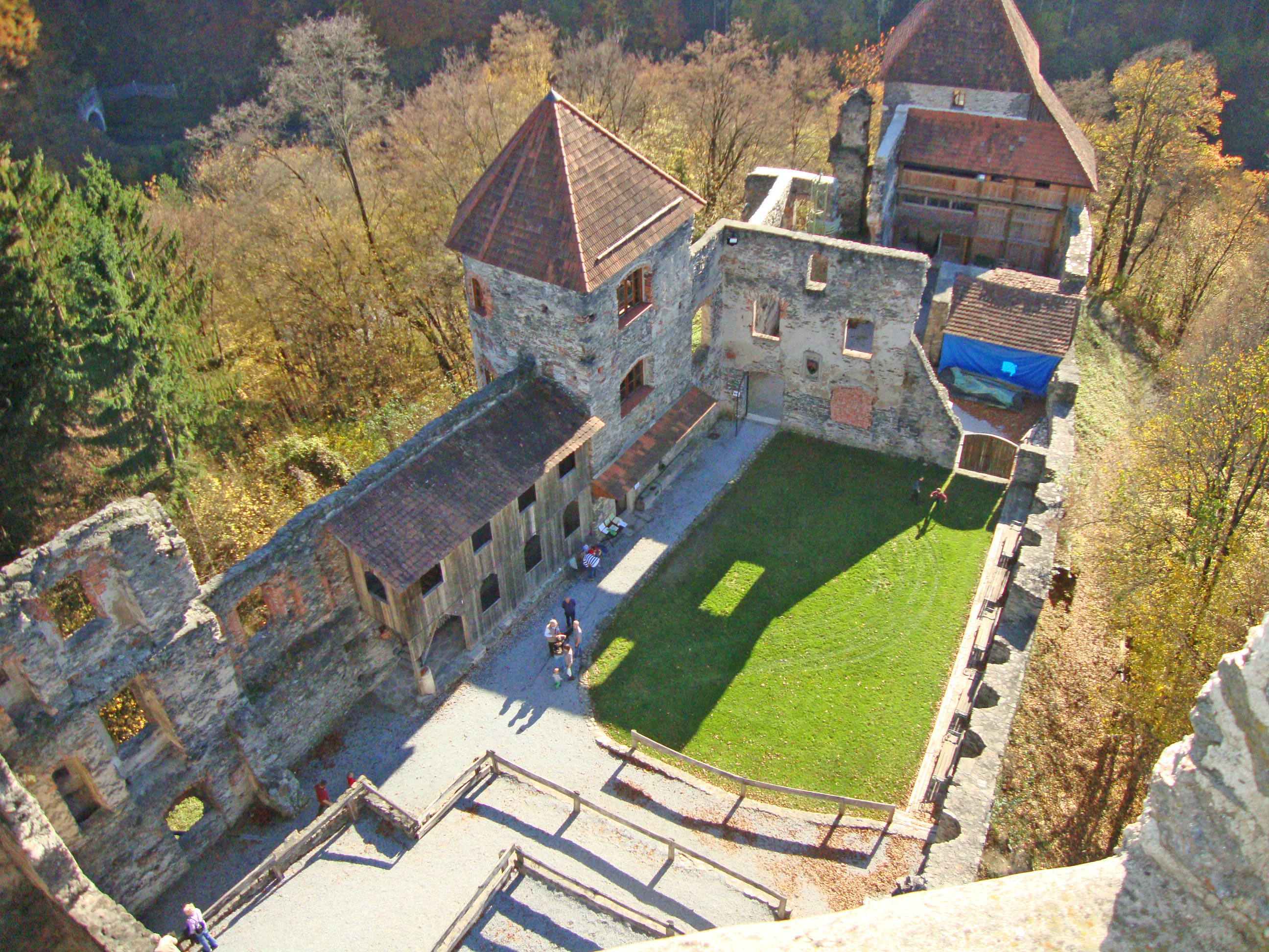 Burgruine Krems